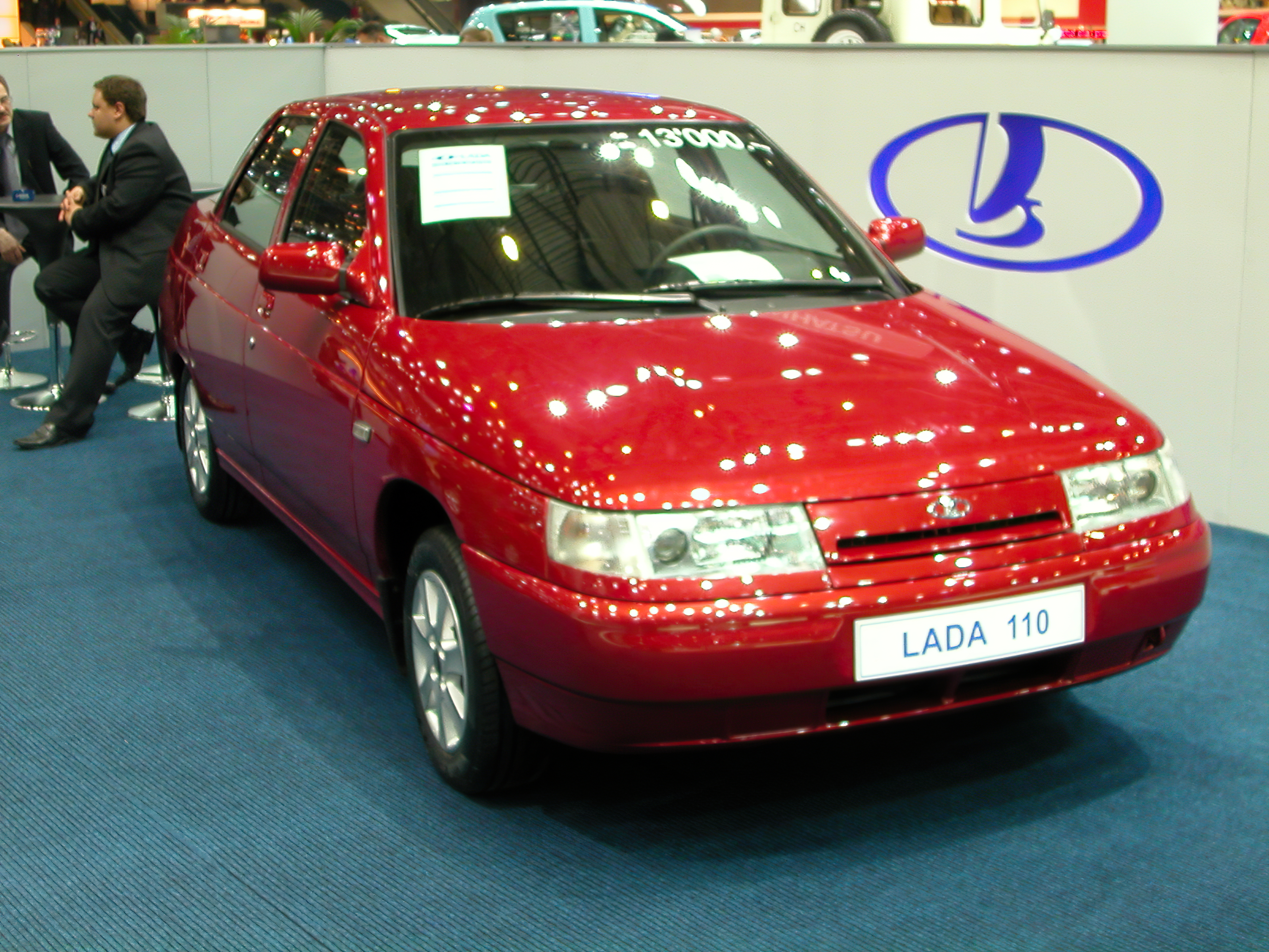 Lada 110 (VAZ 2110) in Genewa 2005Lada 110